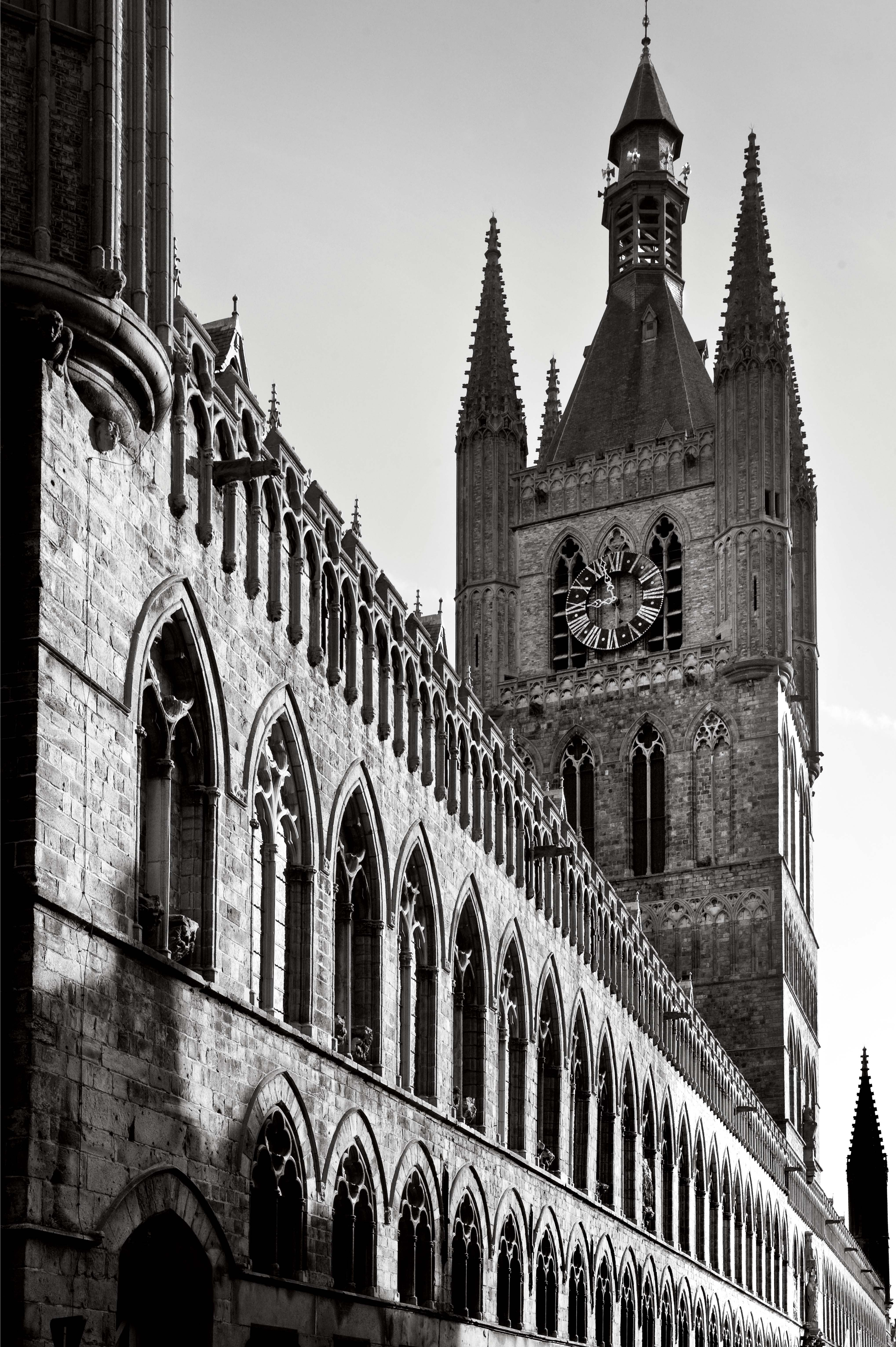 Belfort van Ieper.